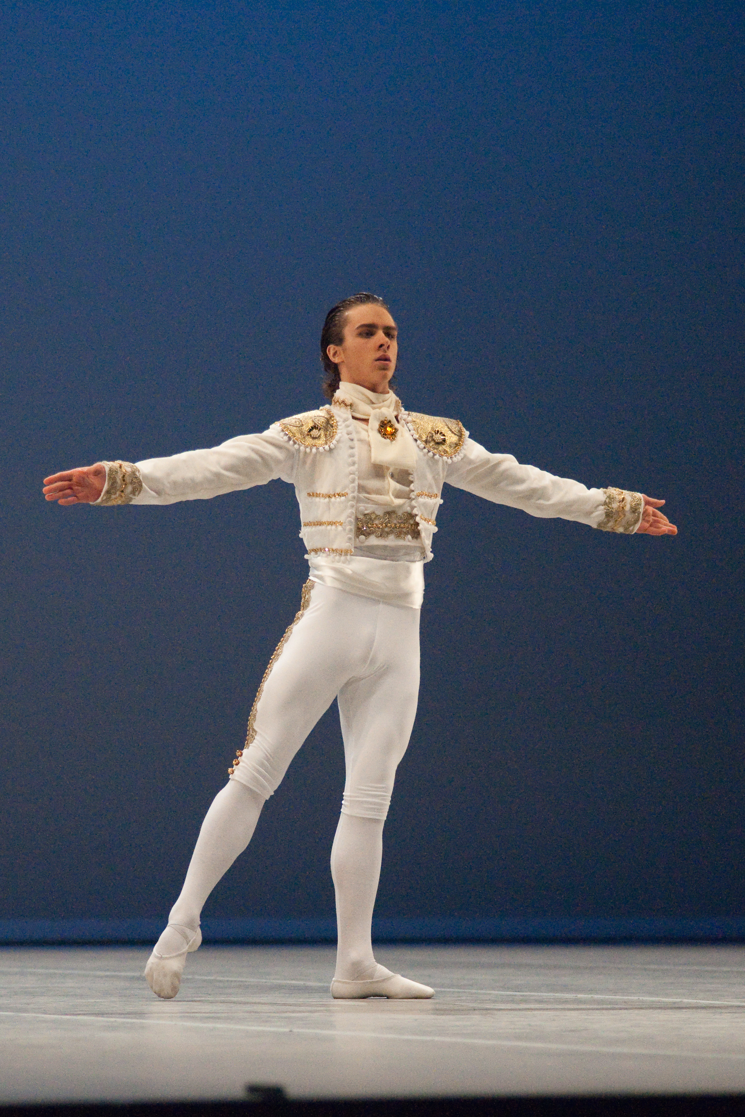 Variation extraite de Don Quichotte au Prix de Lausanne 2010. The making of this document was supported by Wikimedia CH. (Submit your project!) For all the files concerned, please see the category Supported by Wikimedia CH.